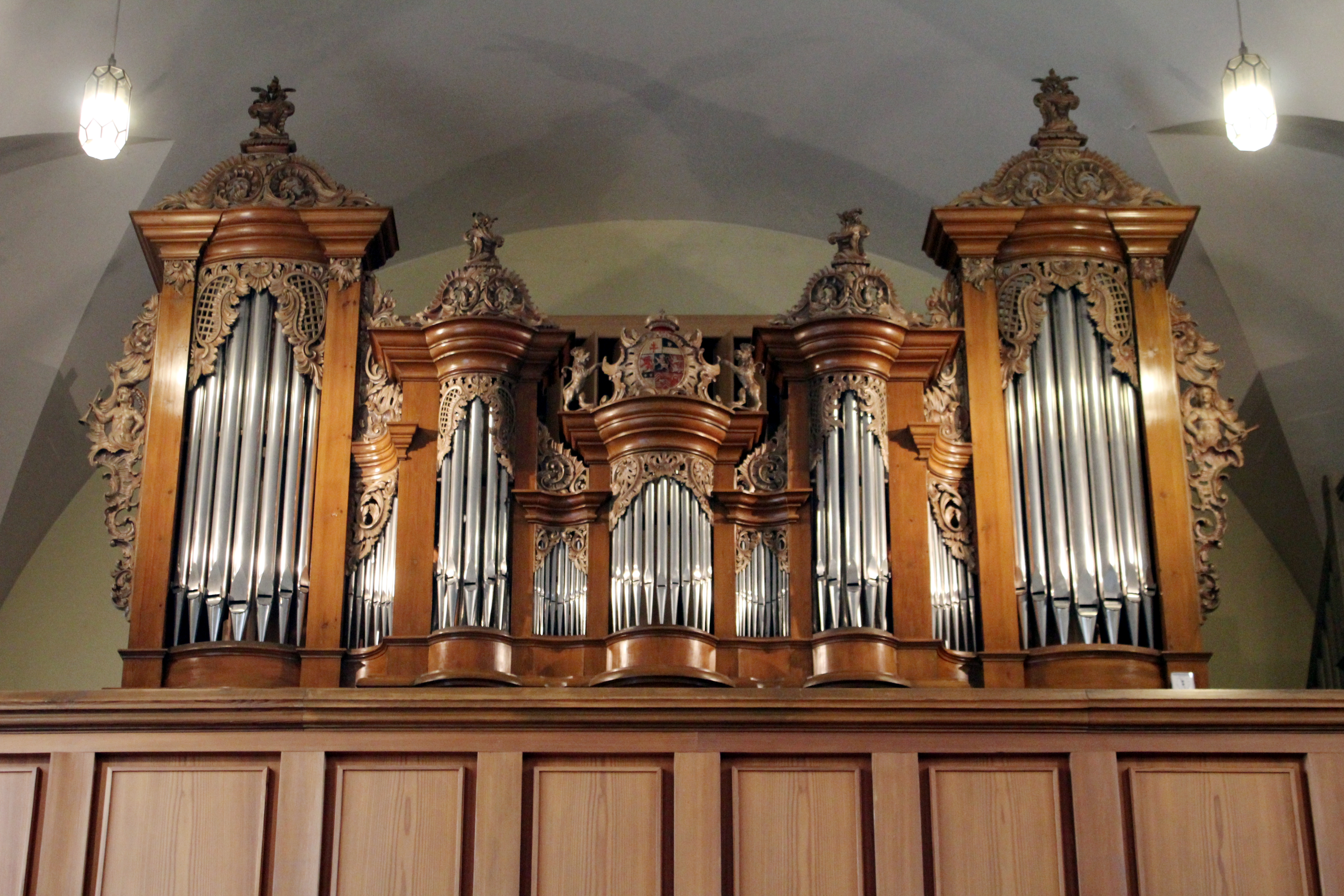 Friedenskirche Hanau-Kesselstadt, Main-Kinzig-Kreis, Hessen, Deutschland